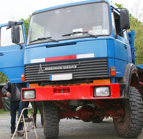 Magirus-Deutz 256M19 Kipper